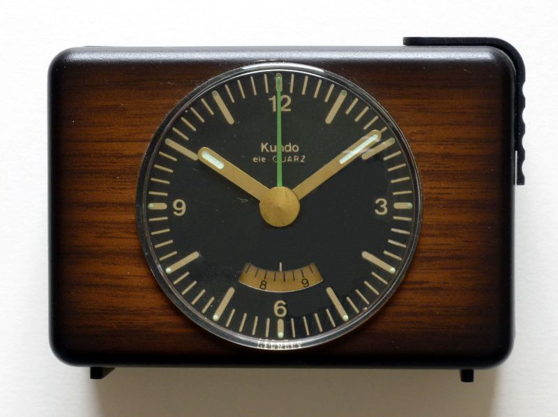 Kundo-Quarzwecker, um 1976, Preis damals 69,- DM